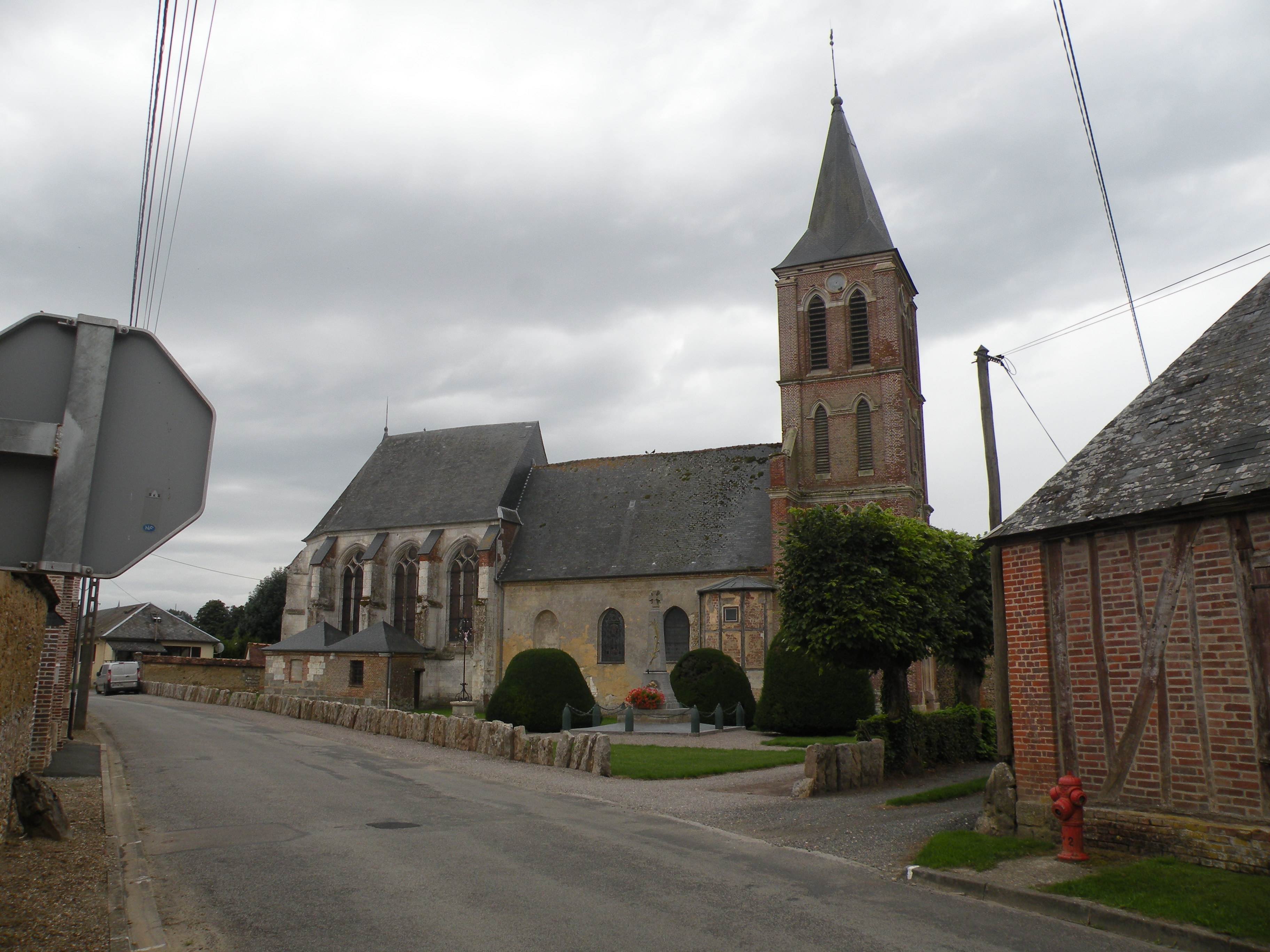 Église Saint-Lucien de Crillon